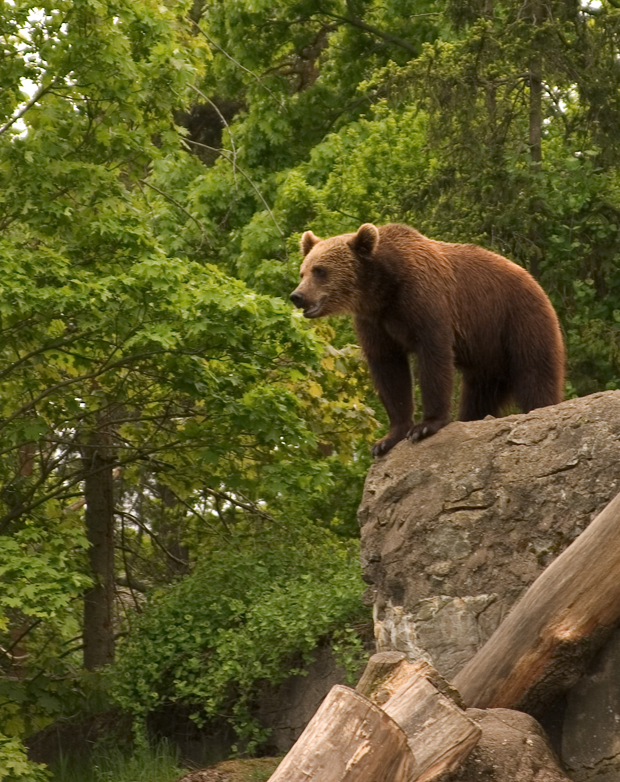 A bear, Ursus arctos in Skansen, Stockholm.